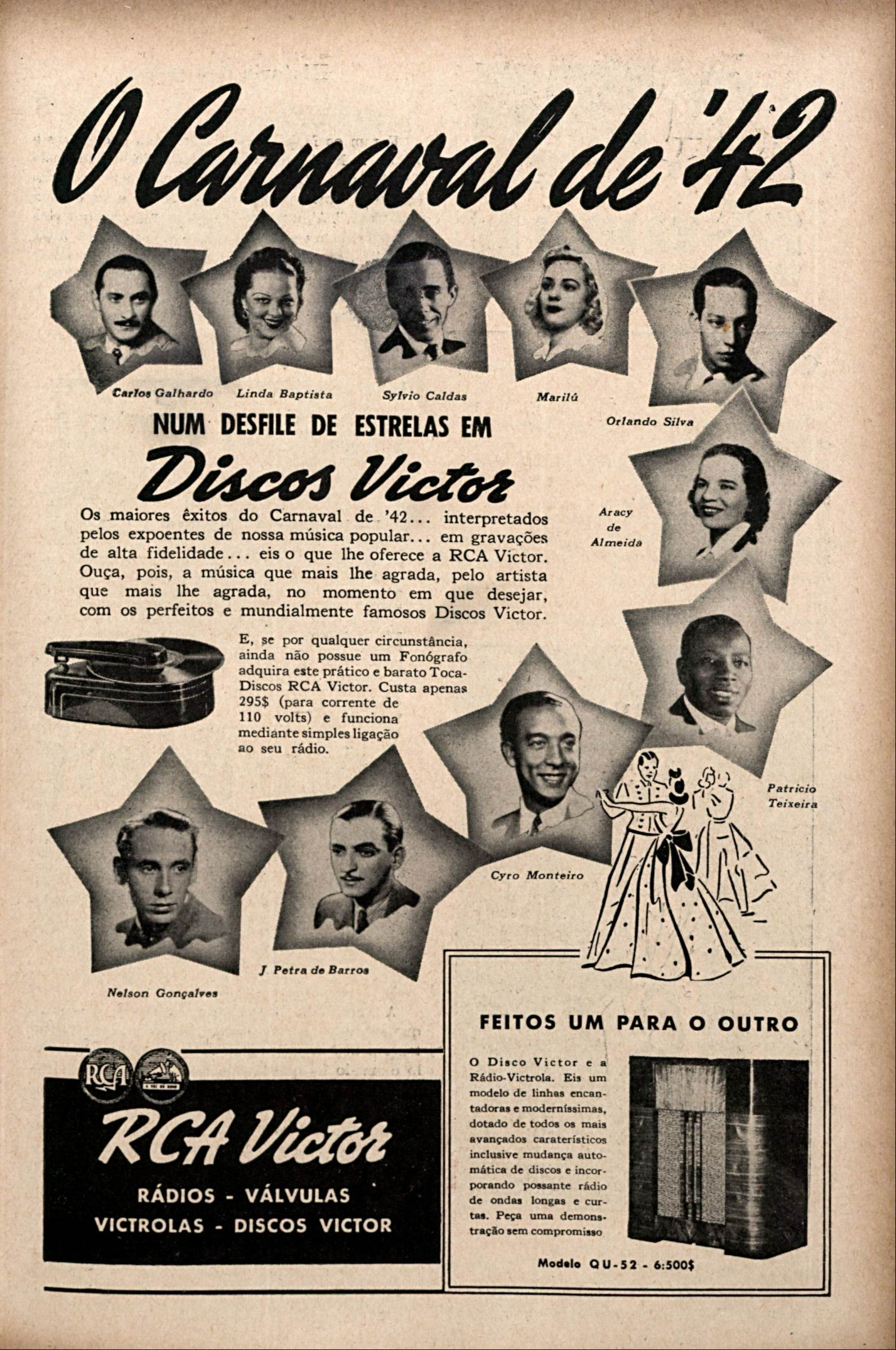 Propaganda da RCA Victor no carnaval de 1942, onde anuncia seu fonógrafo popular e os discos dos seus principais artistas: Carlos Galhardo, Linda Batista, Silvio Caldas, Marilu, Orlando Silva, Aracy de Almeida, Patrício Teixeira, Ciro Monteiro, J. Petra de Barros e Nelson Gonçalves.